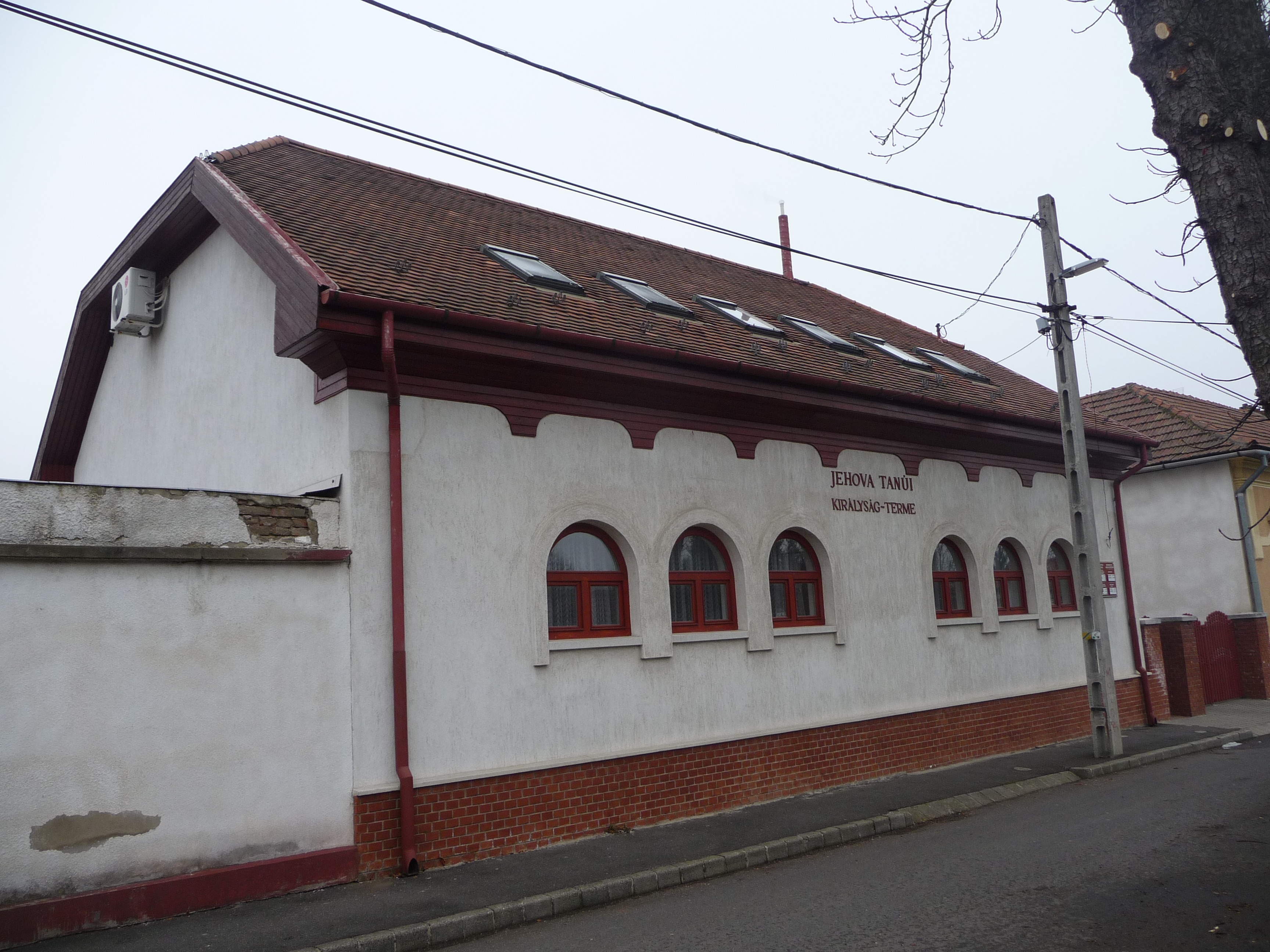 A Jehova tanúi felekezet királyság-terme Diósgyőrben